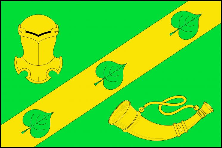 Řitka vlajka